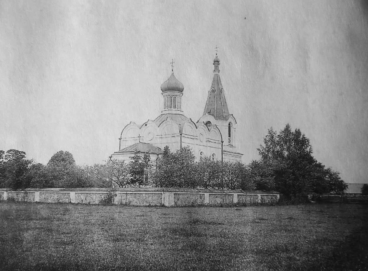 Беларуская (тарашкевіца): Славенск (Słaviensk). Царква-мураўёўка Сьвятога Мікалая